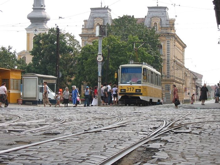 Tramvai Timisoara, Piata Traian